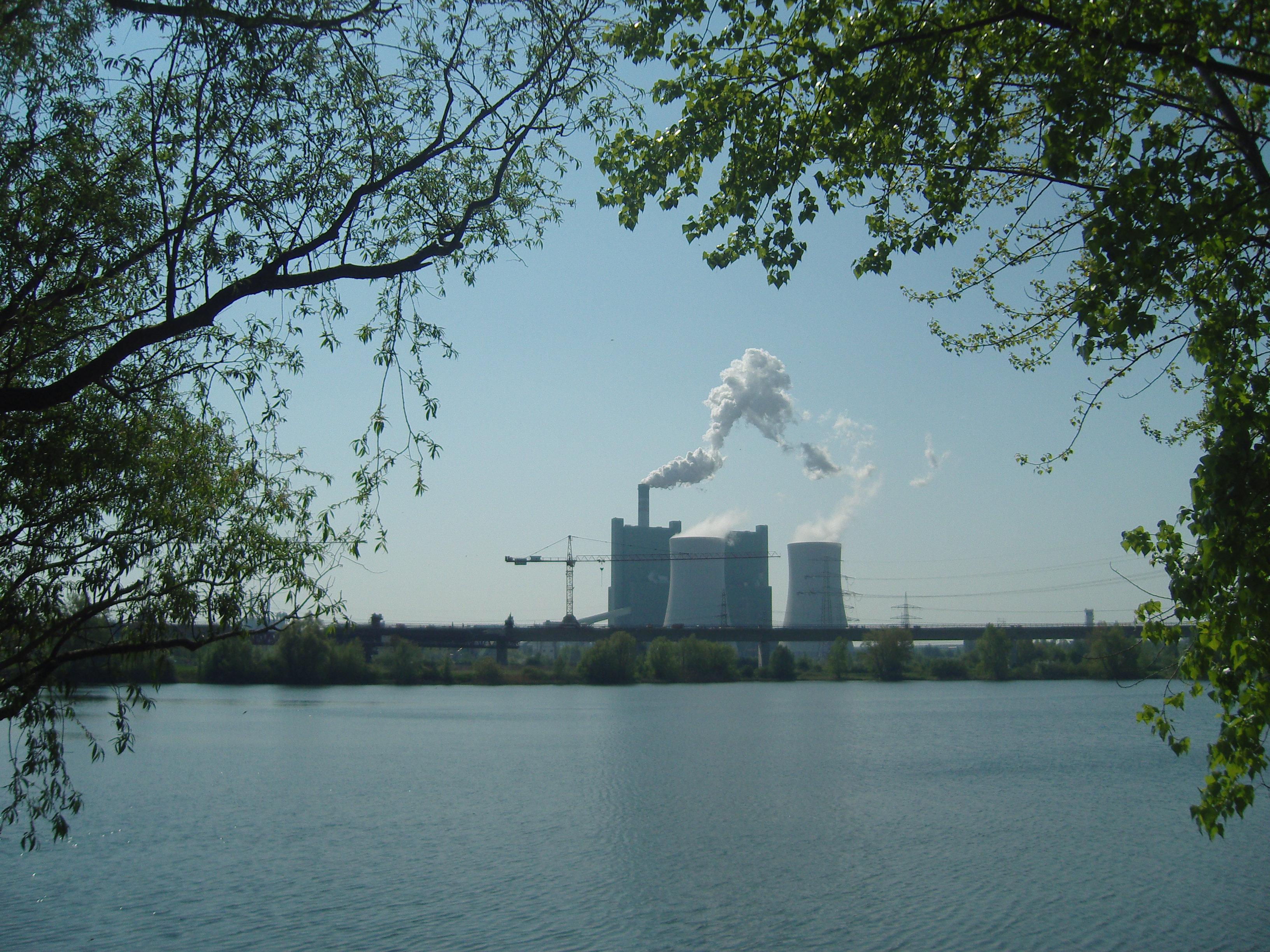 Kraftwerk Schkopau vom Rattmannsdorfer See aus gesehen